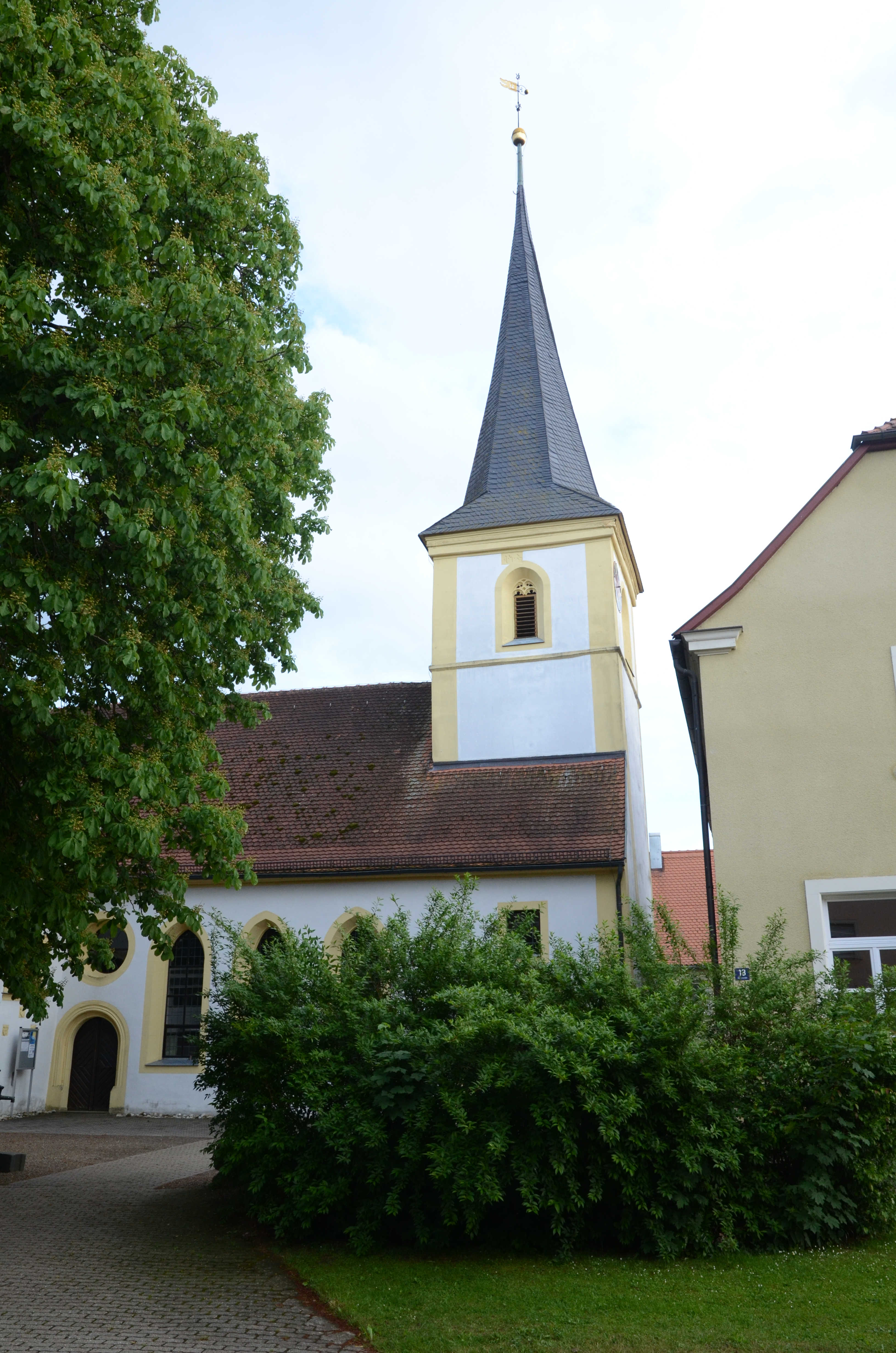 evang.-luth. Kirche St. Johannes der Täufer inn Ullstadt